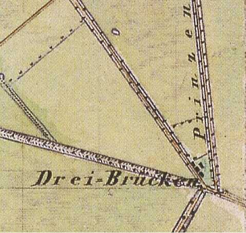 Dreibrück, Gemeindeteil von Deutschhof, einem Ortsteil der Gemeinde Fehrbellin, Lkr. Ostprignitz-Ruppin, Brandenburg Ausschnitt aus dem Urmesstischblatt 3332 Ribbeck von 1839